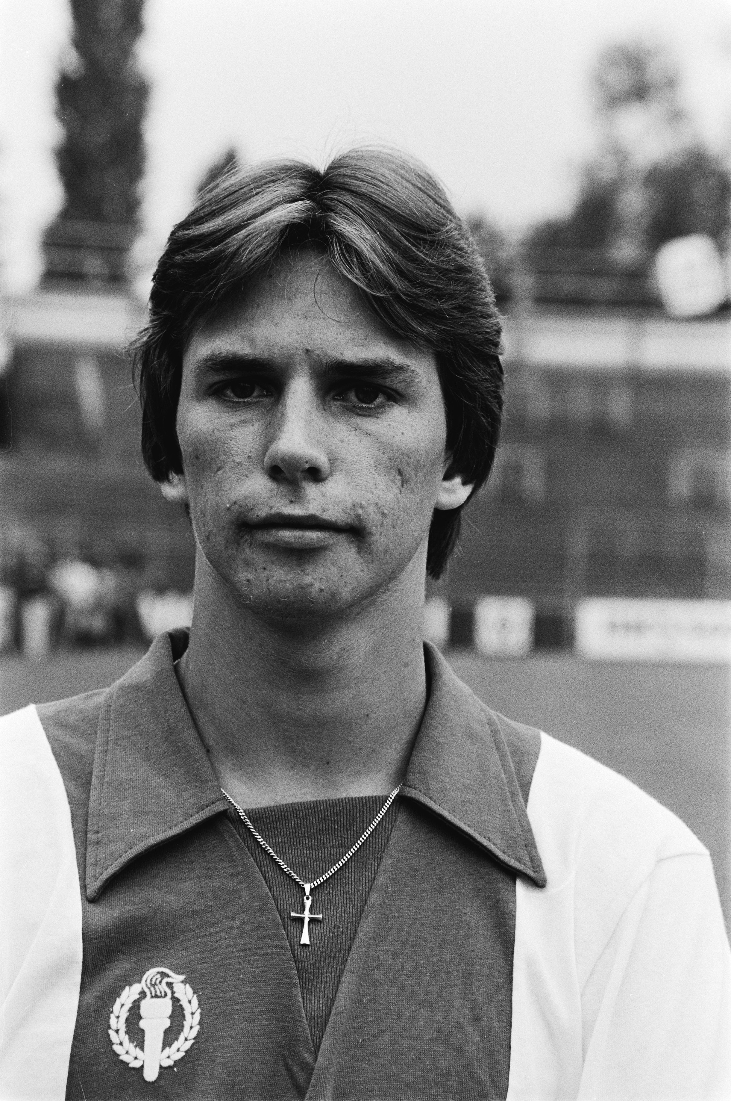 Premier entraînement de l'Ajax pour la nouvelle saison 1979-1980. Photographie de le milieu de terrain néerlandais NL:Martin van Geel par Hans van Dijk / Anefo (Amsterdam, 1979).